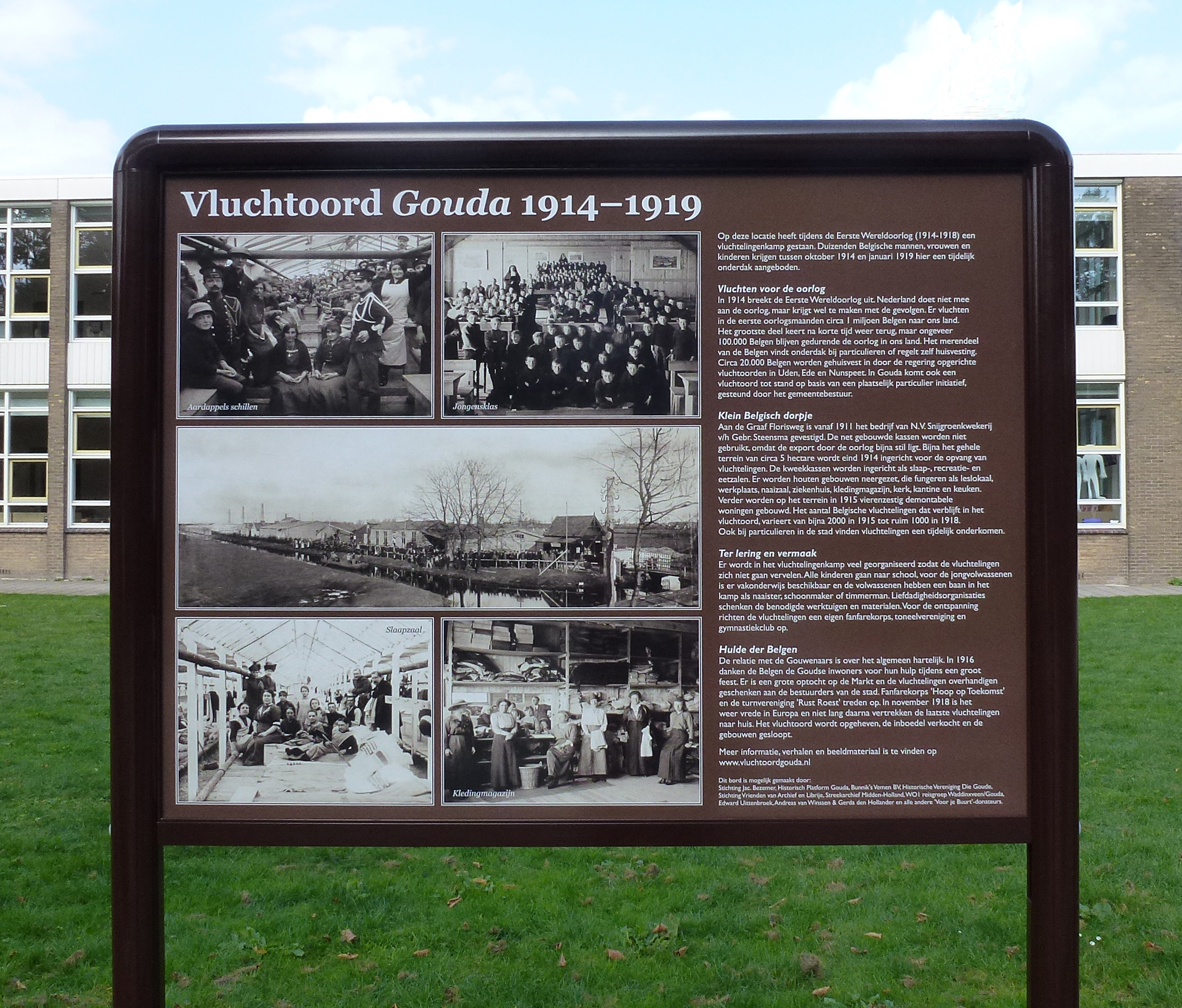 Belgische vluchtelingen op de vlucht voor het 1e wereld oorlogsgeweld in hun eigen land, verbleven gedurende enige jaren in Gouda. Op het terrein van de Snijgroenkwekerij, v/h Gebroeders Steensma, aan de Graaf Florisweg ontstond een klein Belgisch dorpje met slaapzalen, keuken, kerk, naaikamer etc. Op 17 sept. 2016 werd het herdenkingsbord door de Belgische ambassadeur Chris Hoonaert en de Goudse Burgemeester Milo Schoenmaker onthuld.Website Vluchtoord Gouda De Koninklijke Bibliotheek heeft de website opgenomen in haar archieven als digitaal erfgoed, dat betekent dat de website en haar informatie bewaard zal blijven voor de toekomst. Bron: Goudse Post 15-02-2017 pagina 21.